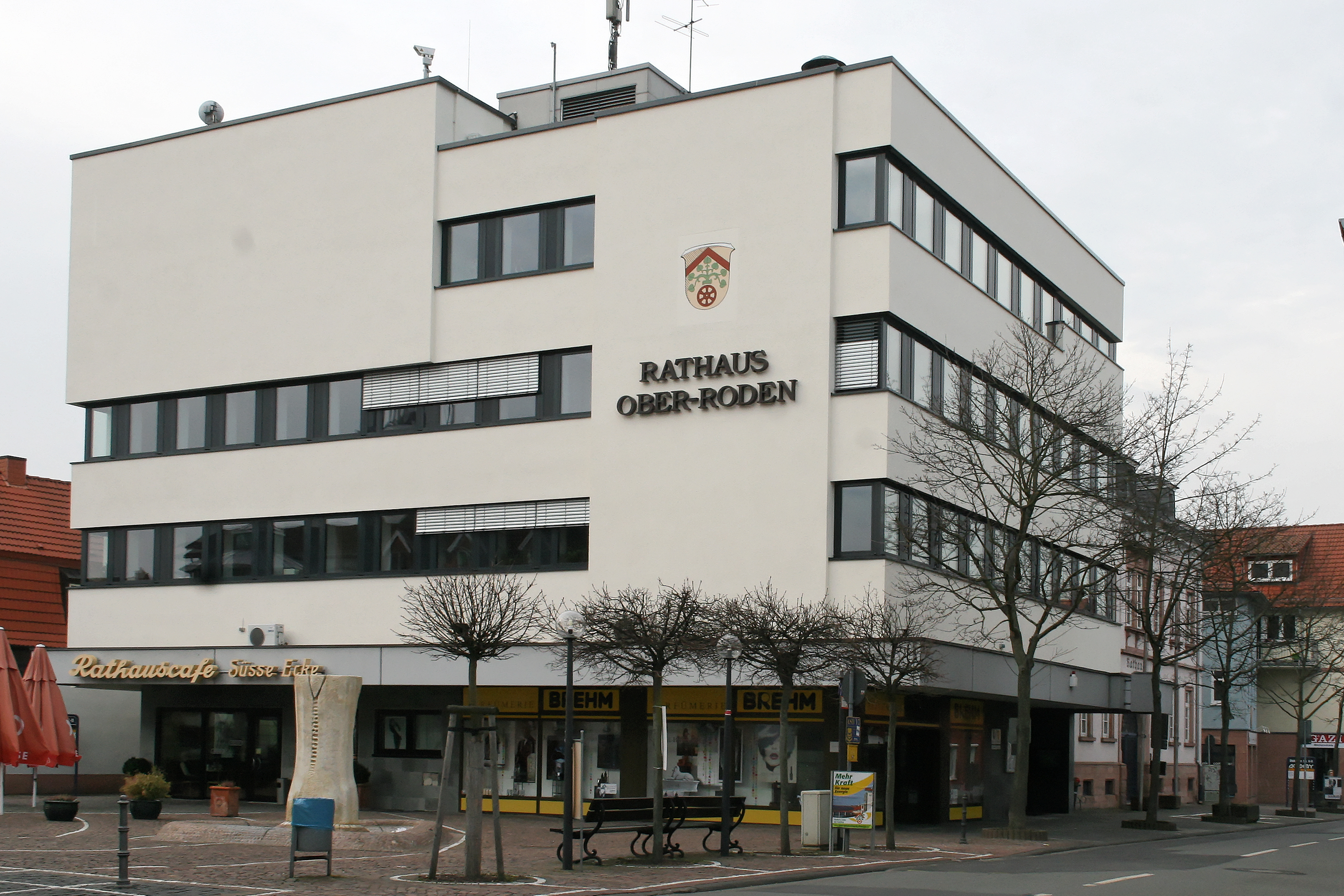 Rathaus in Ober-Roden, einem Stadtteil von Rödermark, erbaut 1975/76 als Erweiterung des alten Rathauses aus dem Jahr 1910.